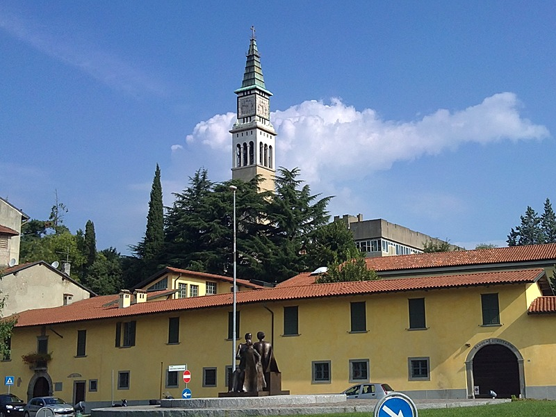 Ponte San Pietro - Scuola Elementare "Caterina Cittadini"